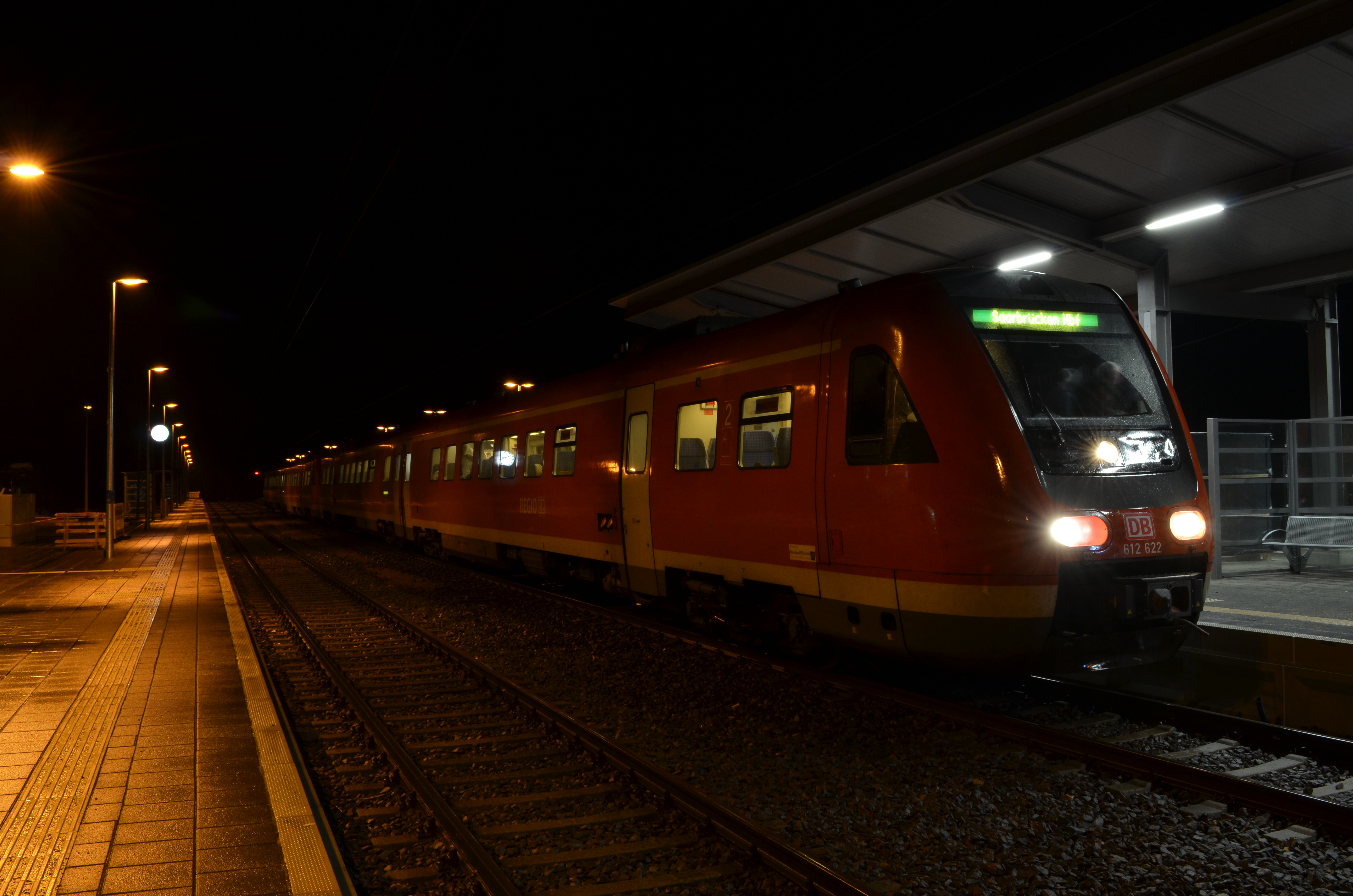 Der letzte von DB Regio betriebene RE3 am 13. Dezember 2014 um 22:26 im vor kurzem modernisierten Bahnhof Türkismühle.